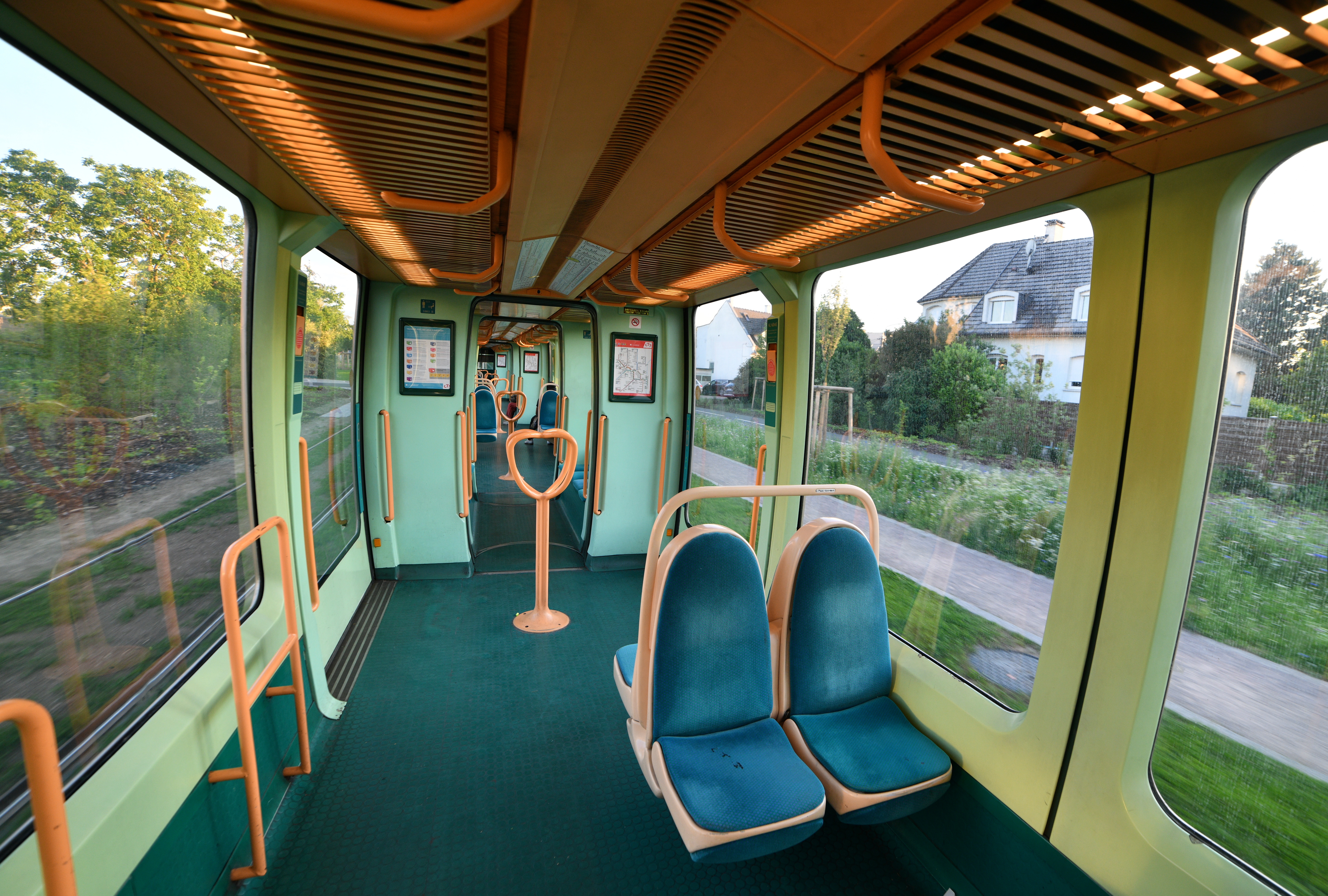 Ligne E strasbourg , intérieur du tram